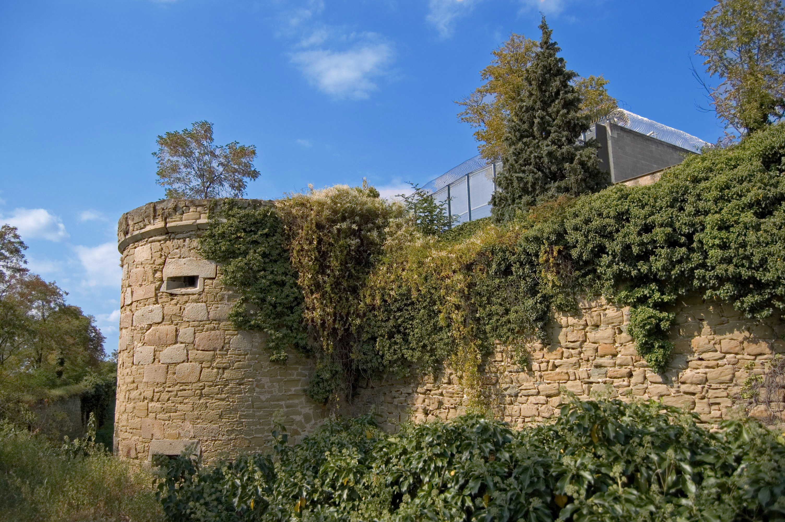 Festung Hohenasperg Justizvollzugskrankenhaus